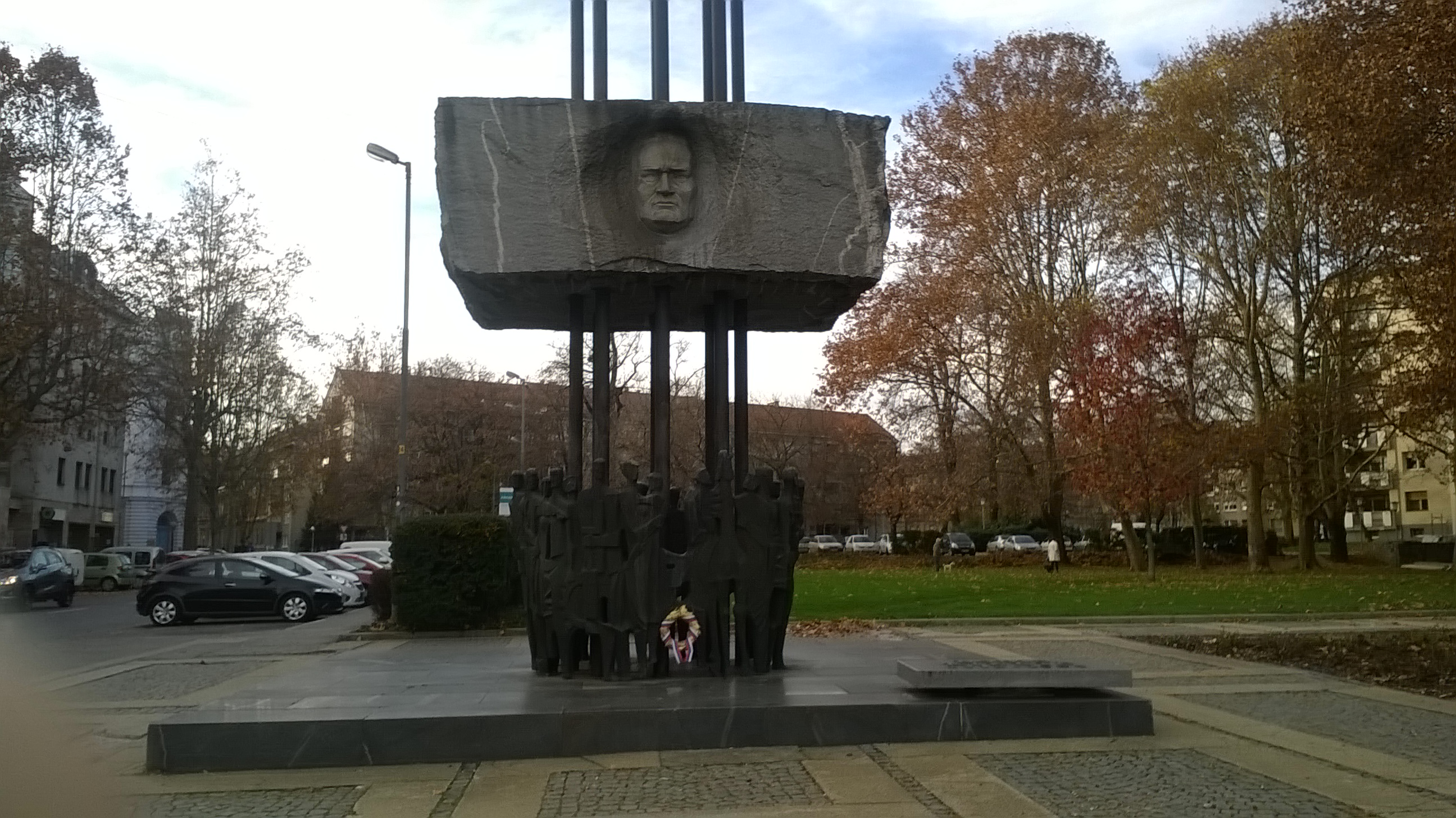 Posnetek trga Borisa Kidriča